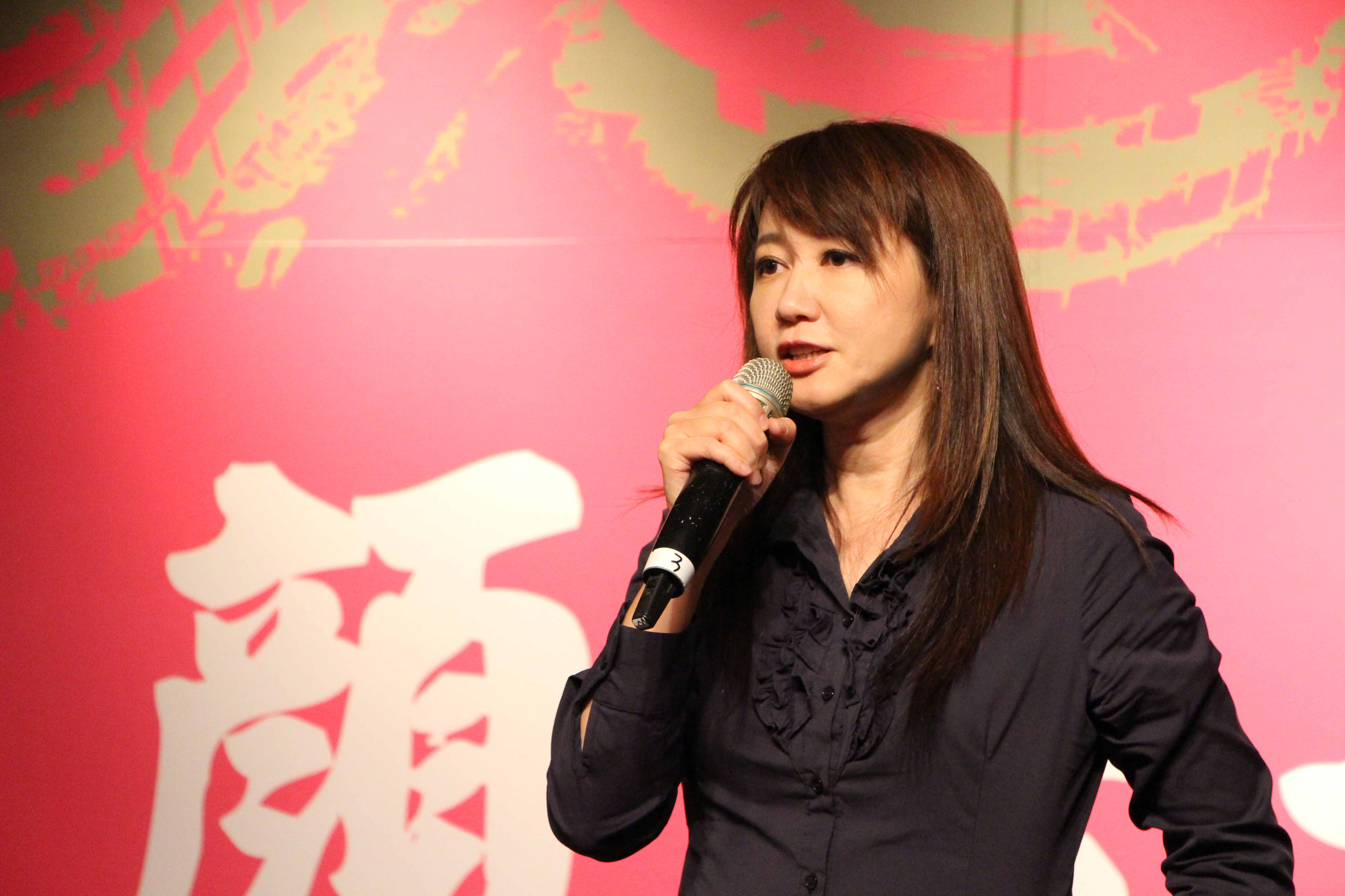 簡余晏的照片